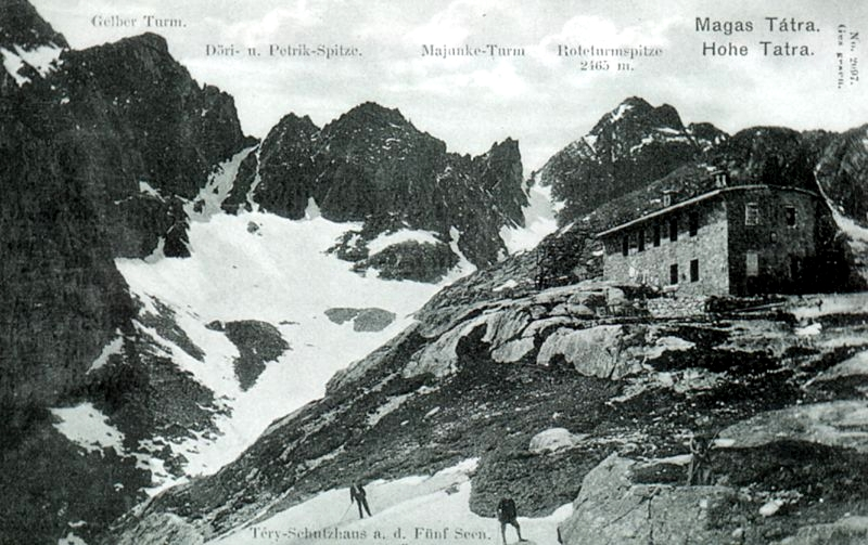 Slowakei, Hohe Tatra, Kleines Kaltwassertal